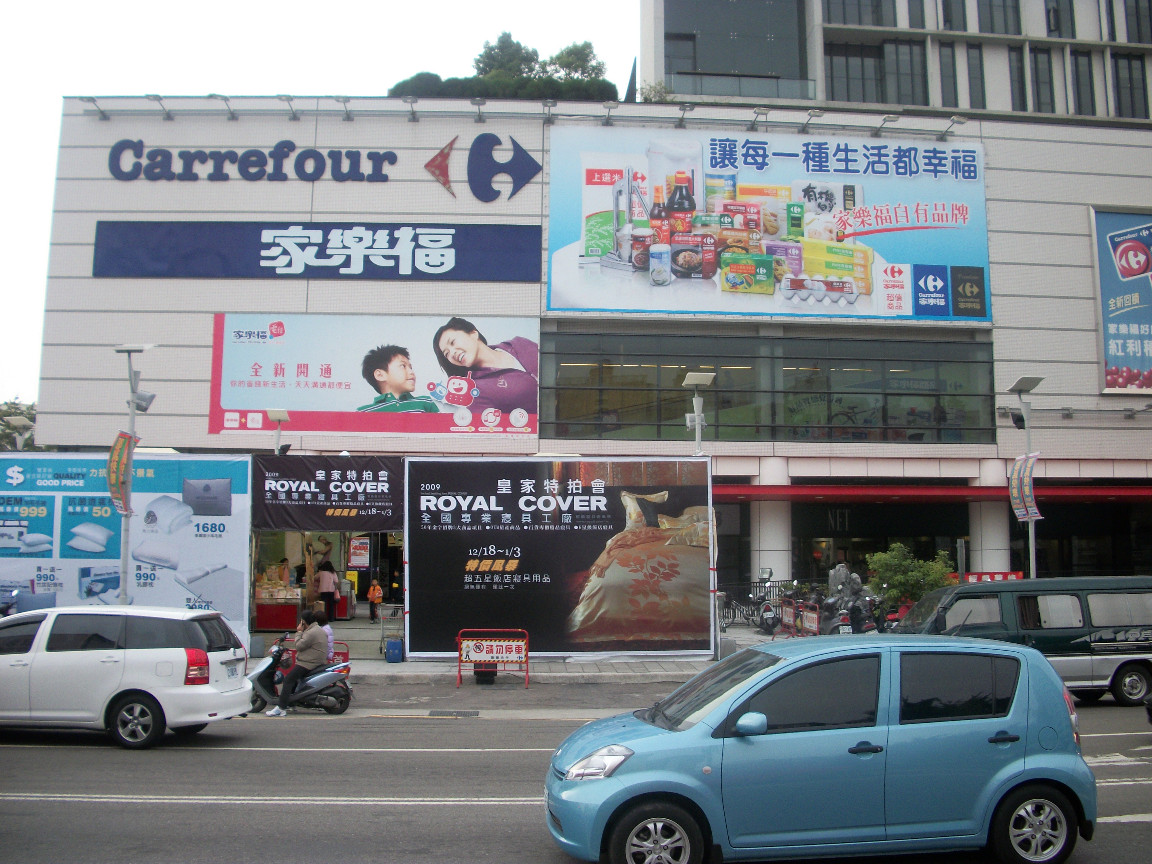 中文（台灣）: 家樂福文心店，位於臺灣臺中市南屯區文心路一段521號。